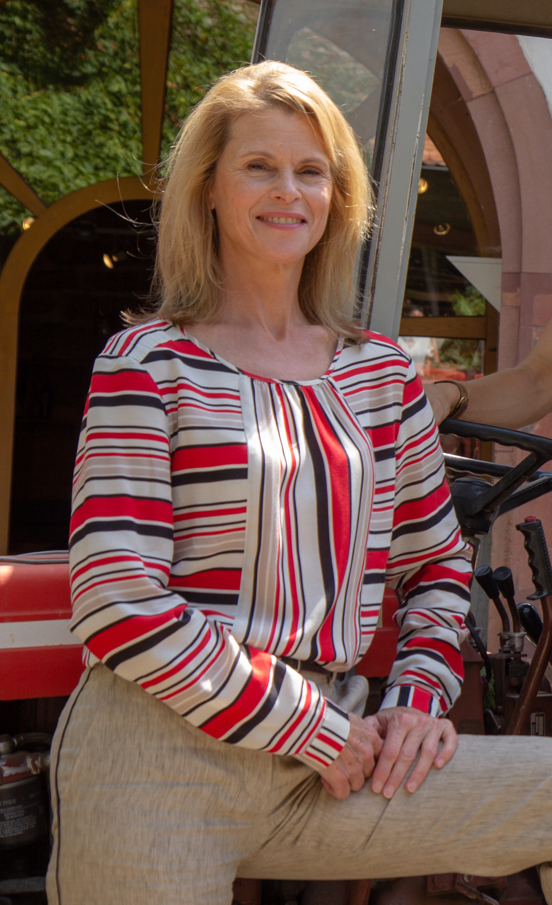 Foto- und Interviewtermin am Set von „Weingut Wader - Das Familiengeheimnis".